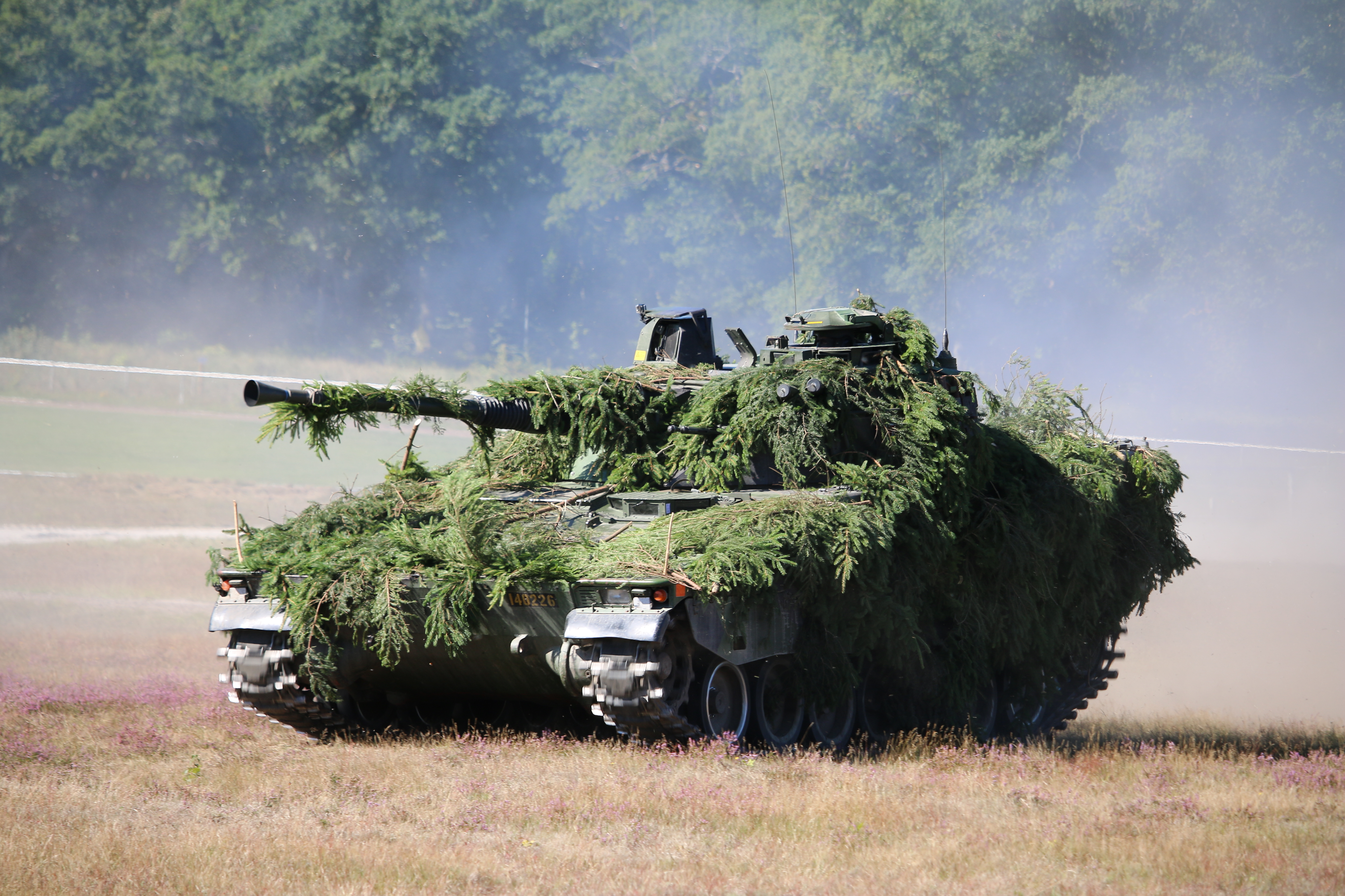 Stridsfordon 9040 Revinge 2016